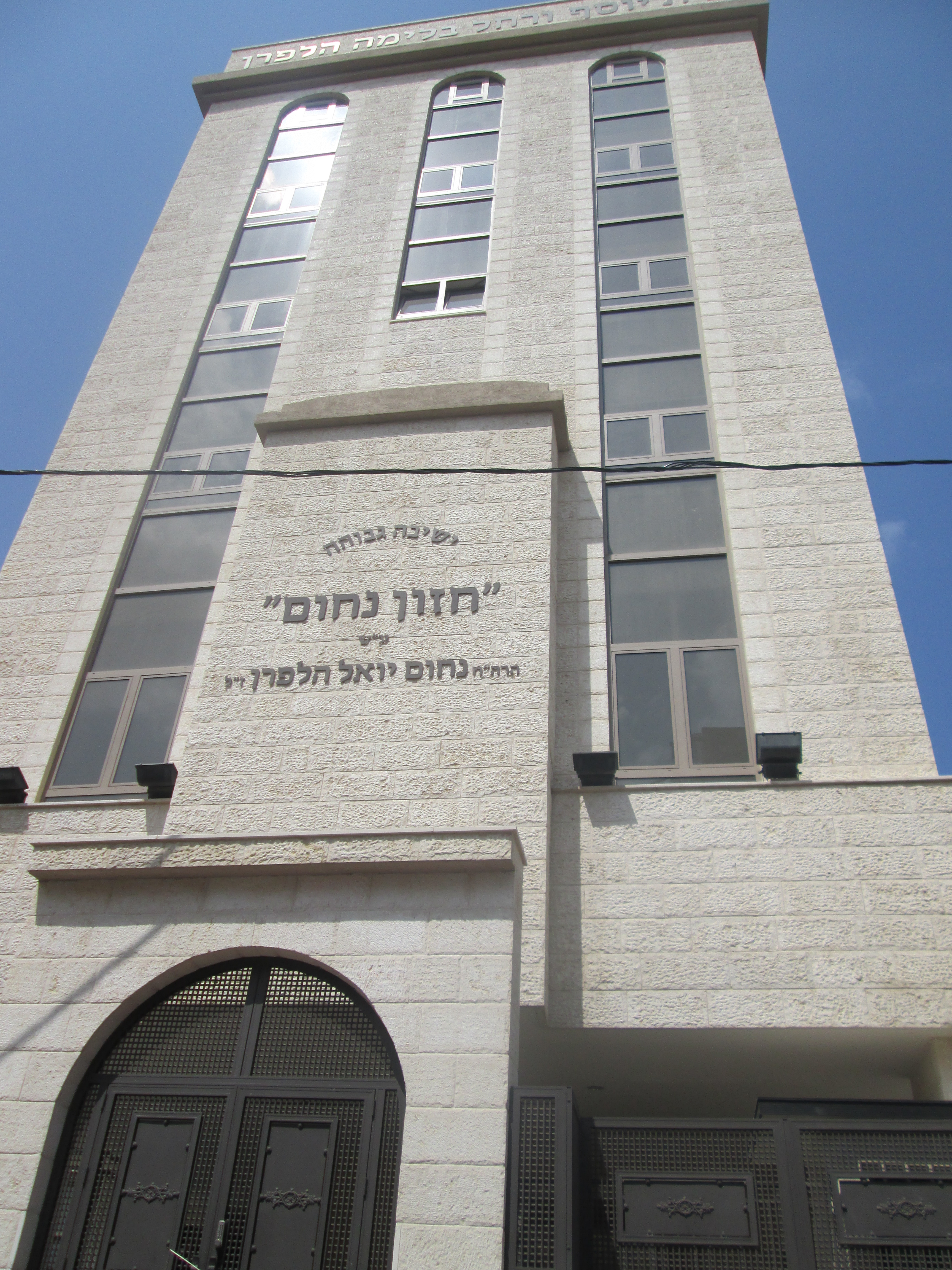 בניין ישיבת חזון נחום בני ברק